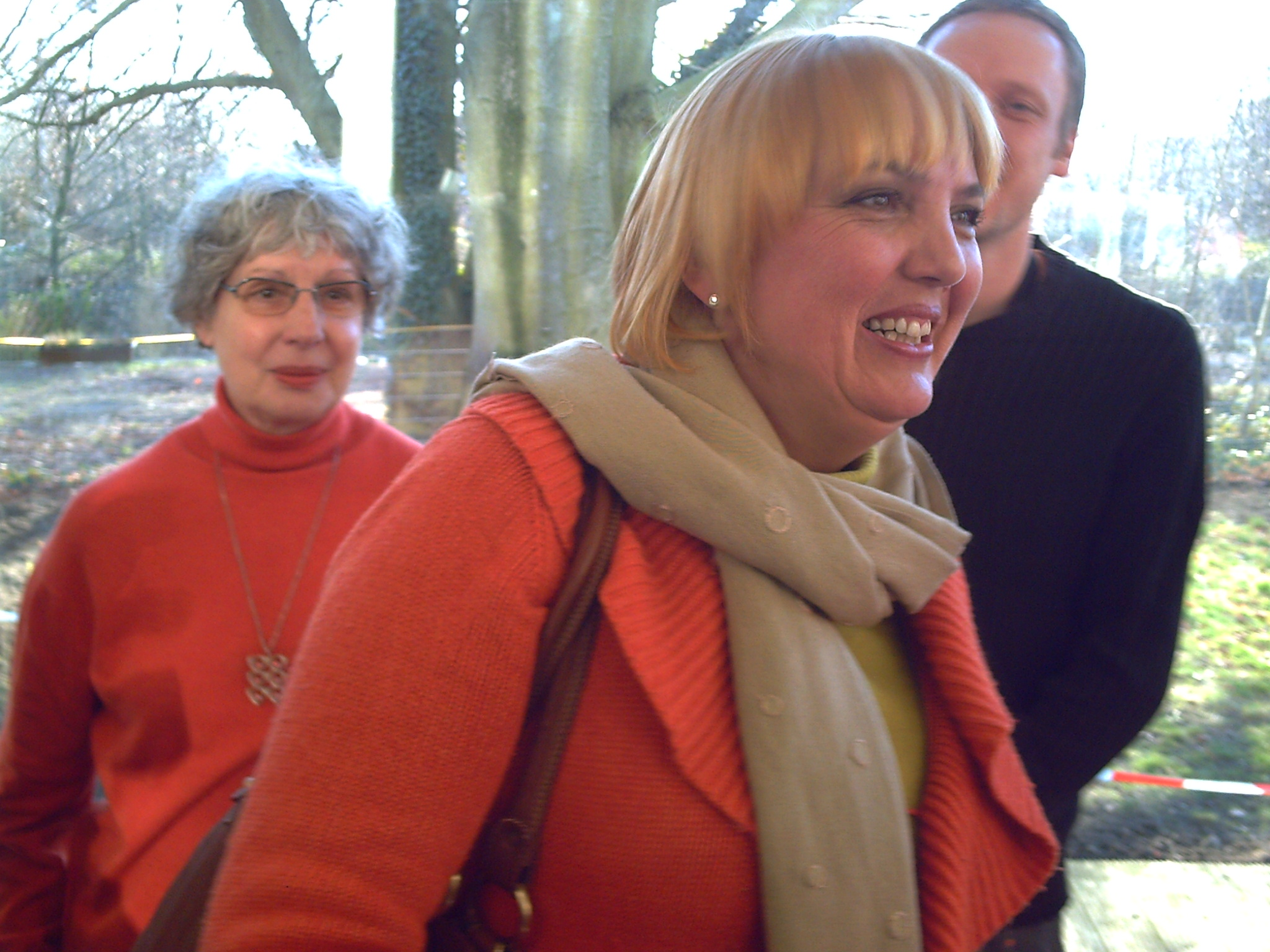 Claudia Roth, Bundesvorsitzende von Bündnis 90/Die Grünen. Im Hintergrund: GrüneR KandidatIn aus Hamburg.